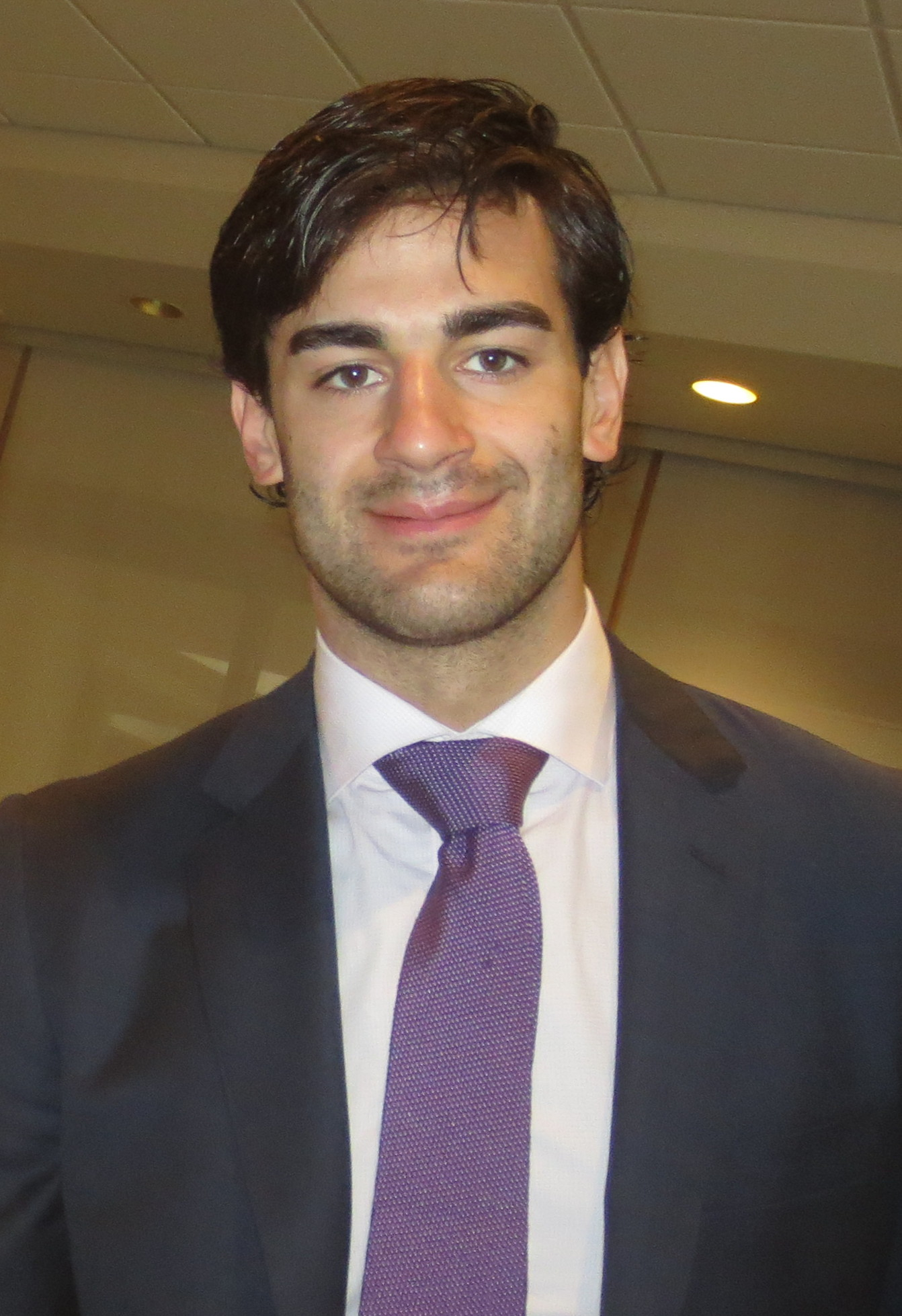 Le joueur de hockey américain Max Pacioretty en 2015.